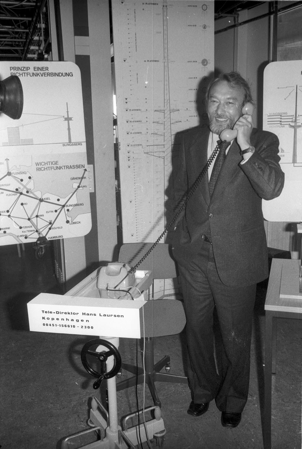 Inbetriebnahme. Der Präsident der Oberpostdirektion (OPD) Kiel Werner Spanehl führt das erste Gespräch über die neue Trasse mit drei Fernmeldetürmen in Schleswig-Holstein nach Kopenhagen.